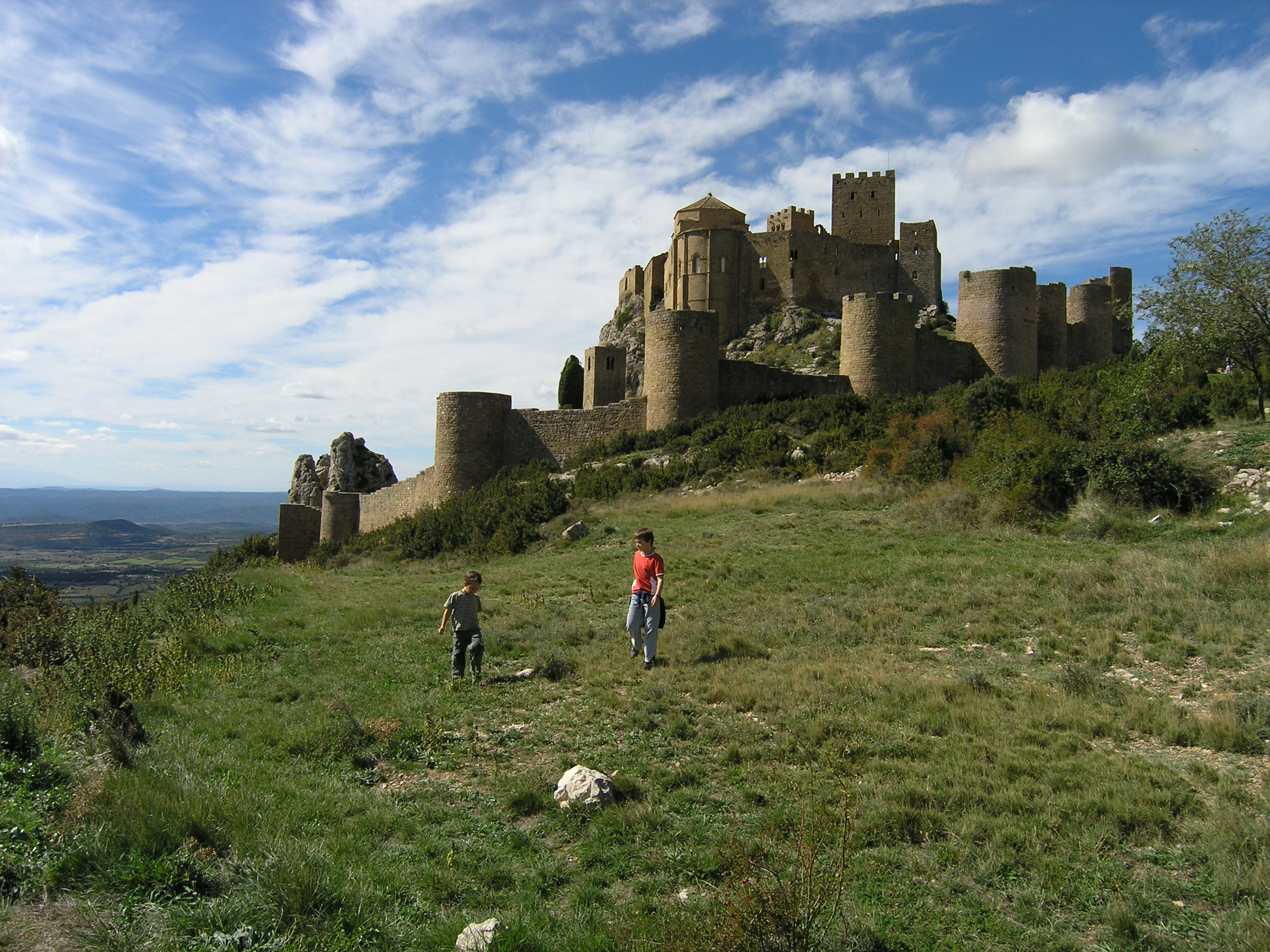 Vista del Castillo de Loarre. Este castillo románico, amurallado con torreones, está en la sierra de Loarre, en la provincia de Huesca (España) (a unos 35 kilómetros de la capital provincial). Fue construido en el siglo XI por orden del rey Sancho III de Navarra sobre un promontorio de roca caliza. Está considerado como la fortaleza románica mejor conservada de Europa.